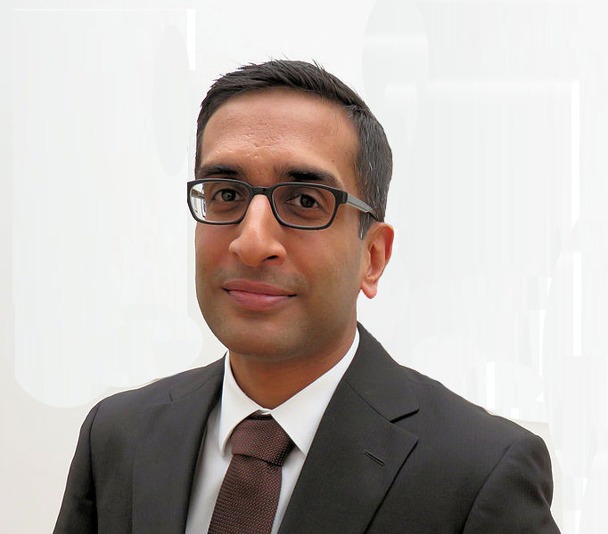 Prof. Raja Narayana Atreya , Universitätsklinikum Erlangen-Nürnberg. Erhielt 2015 den Paul-Ehrlich-und Ludwig-Darmstaedter-Nachwuchspreis